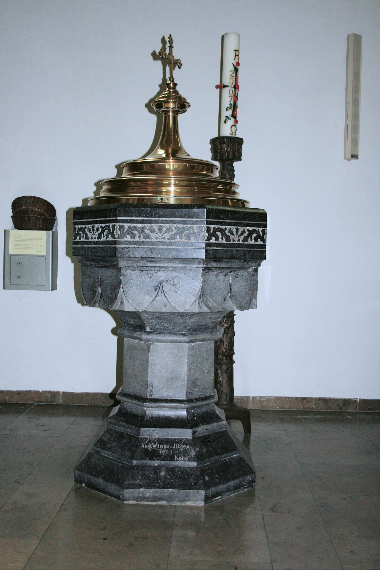 Ruppichteroth-Schönenberg, Taufstein kath. Kirche